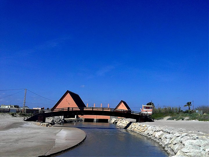 "La Gola" es la desenvocadura de los canales del río Xúquer al Mar Mediterráneo a su paso por El Mareny de Barraquetes.